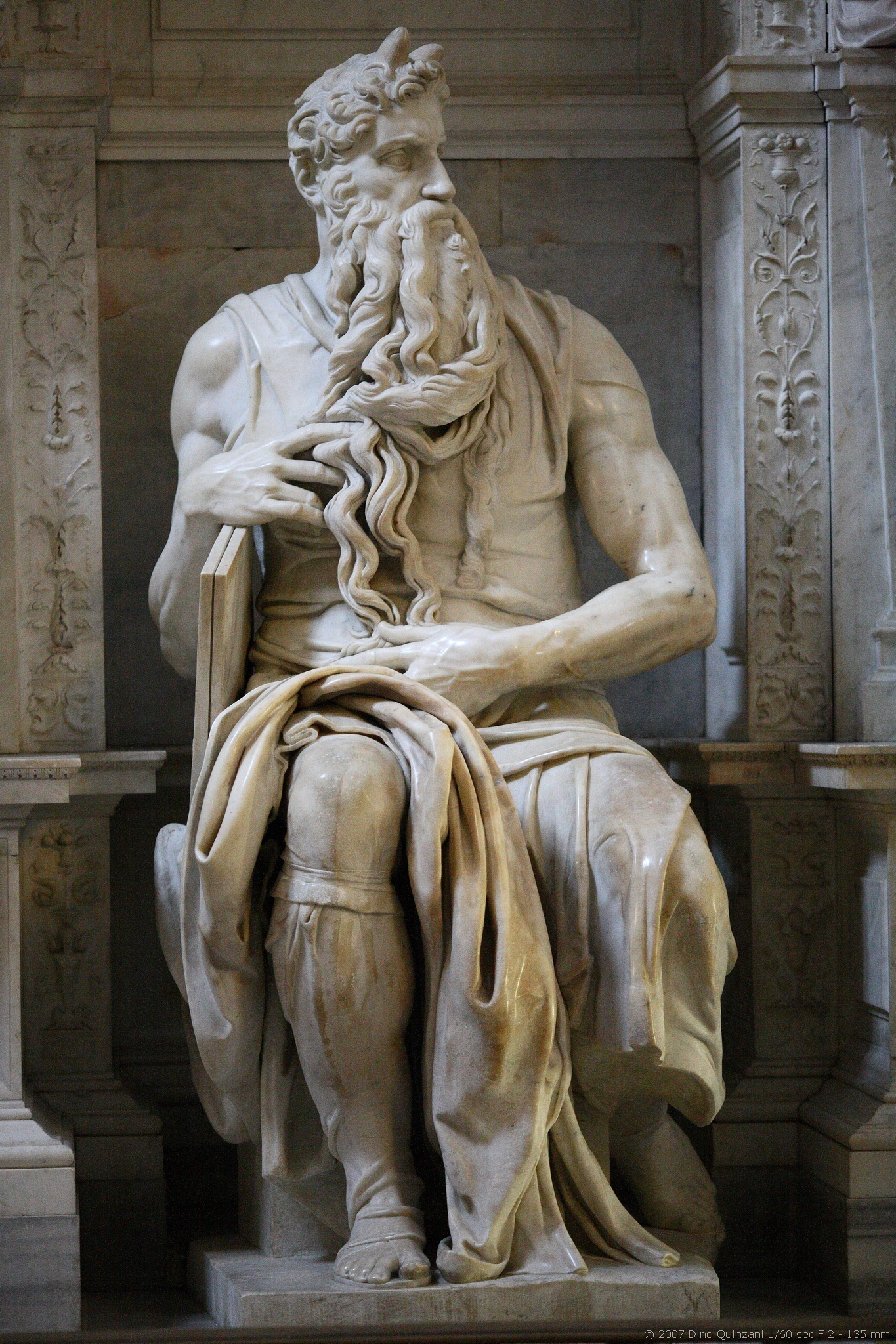 La tomba di Giulio Secondo, a San Pietro in Vincoli. L'opera è di Michelangelo: Link di wikipedia (NB la foto di wikipedia è decisamente peggiore della mia :-) Canon 5D + 135L 1/60s f/2 1600ISO mano libera St. Peter's Basilica Native nameSancti Petri in VaticanoLocationVatican City, ItalyCoordinates41° 54′ 08″ N, 12° 27′ 12″ E Established1626 (year last consecrated)Website control : Q12512 VIAF: 123088347 ISNI: 0000 0000 8521 5588 LCCN: n81013646 NLA: 35223155 GND: 4076822-3 WorldCat